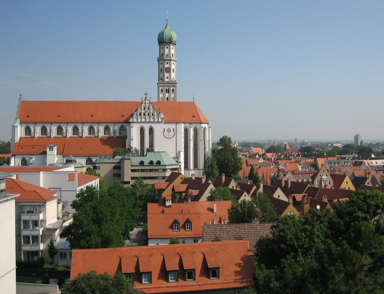 Basilika St. Ulrich und Afra in Augsburg mit Blick über das Ulrichsviertel